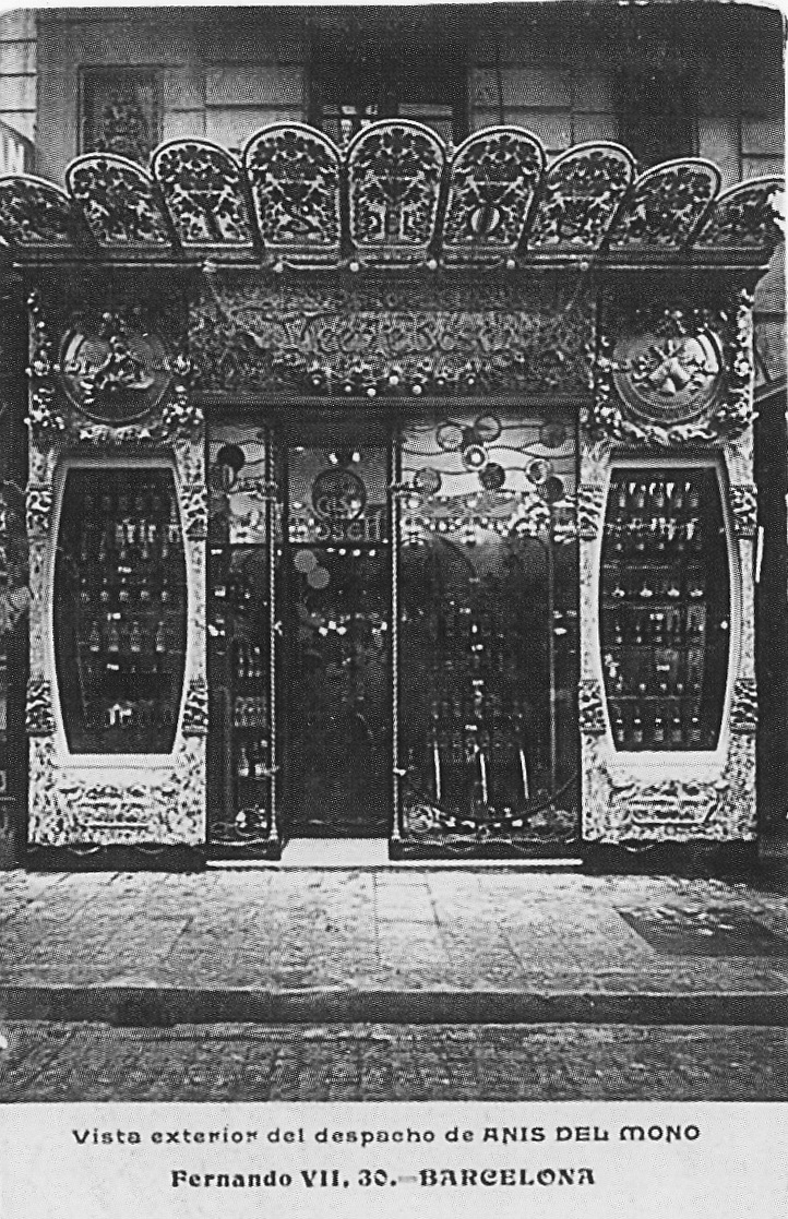 Botiga d'Anis del Mono instal·lada al carrer Ferran 30(Barcelona, Catalunya). Disseny de Salvador Alarma de 1905. Va guanyar el premi anual de l'Ajuntament de Barcelona.